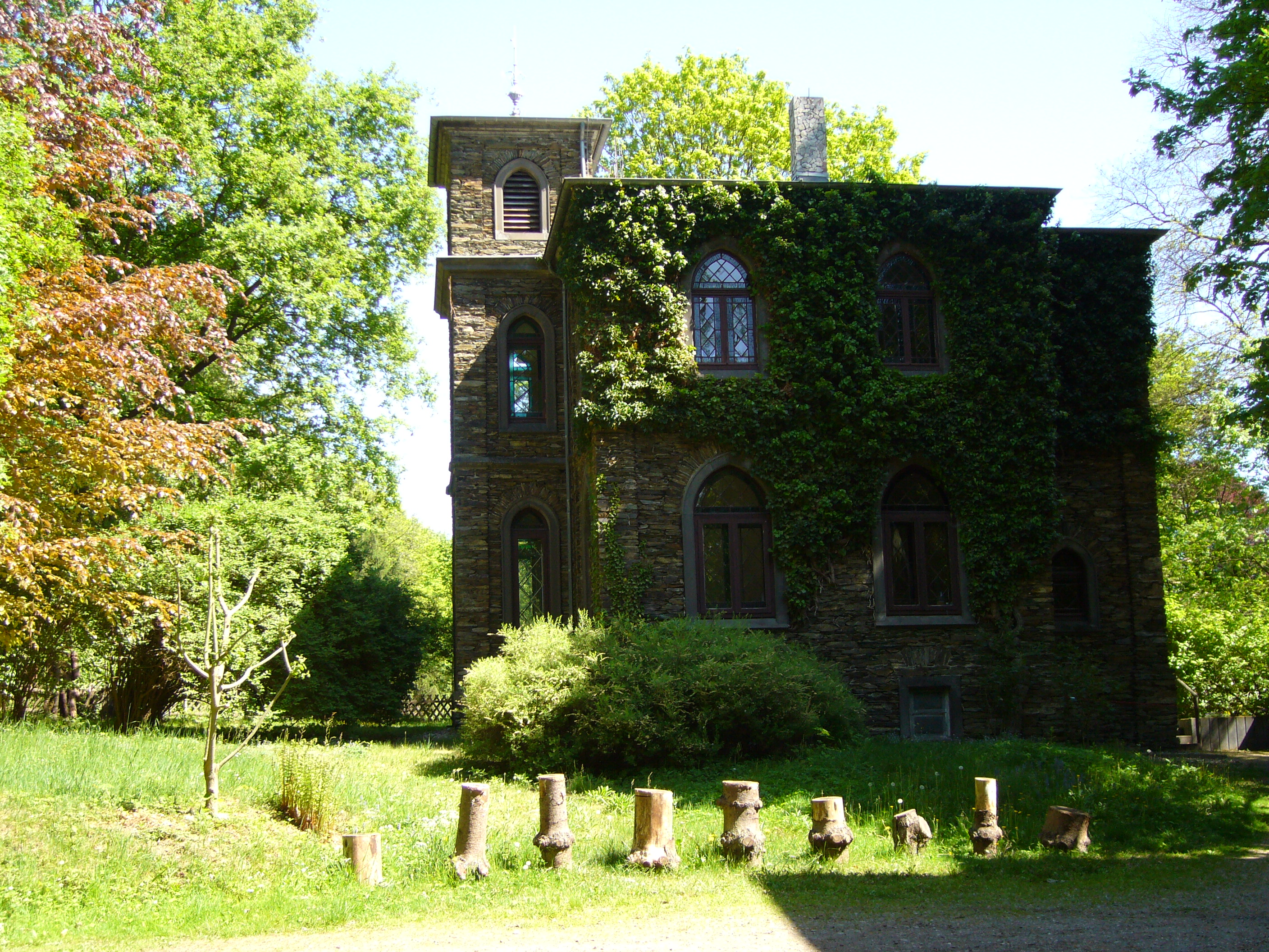 Monrepos